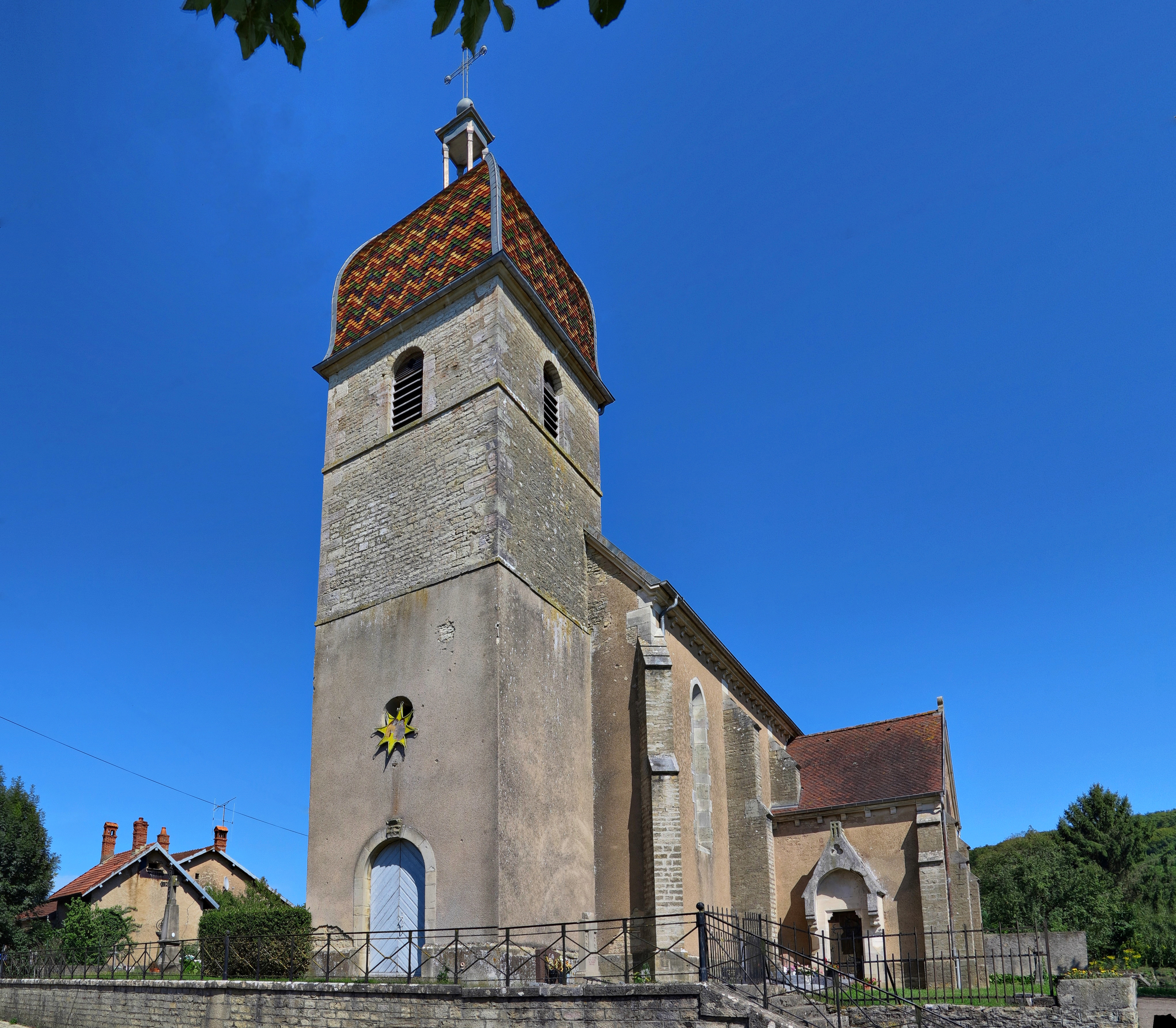 L'église